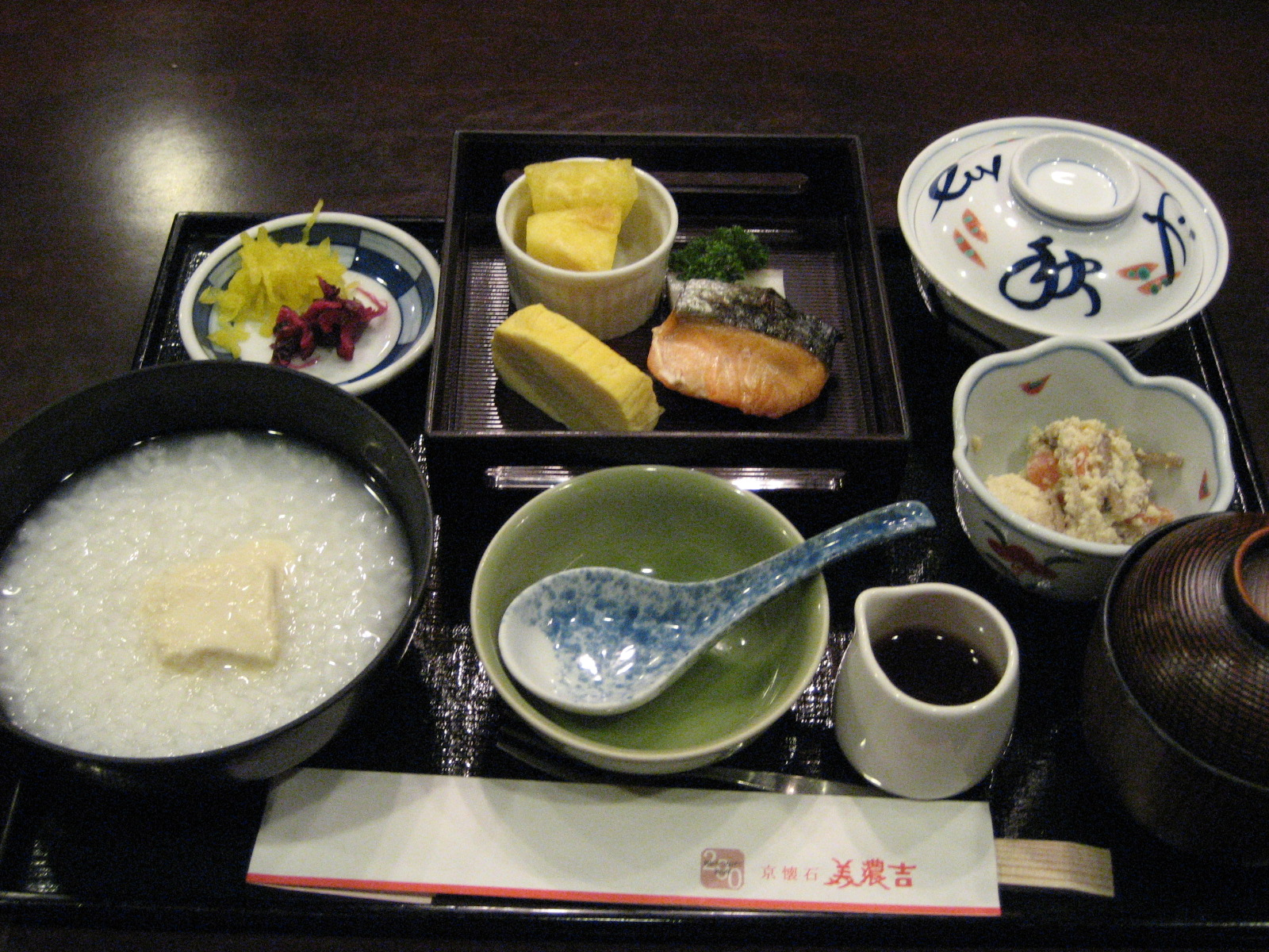 朝ごはん